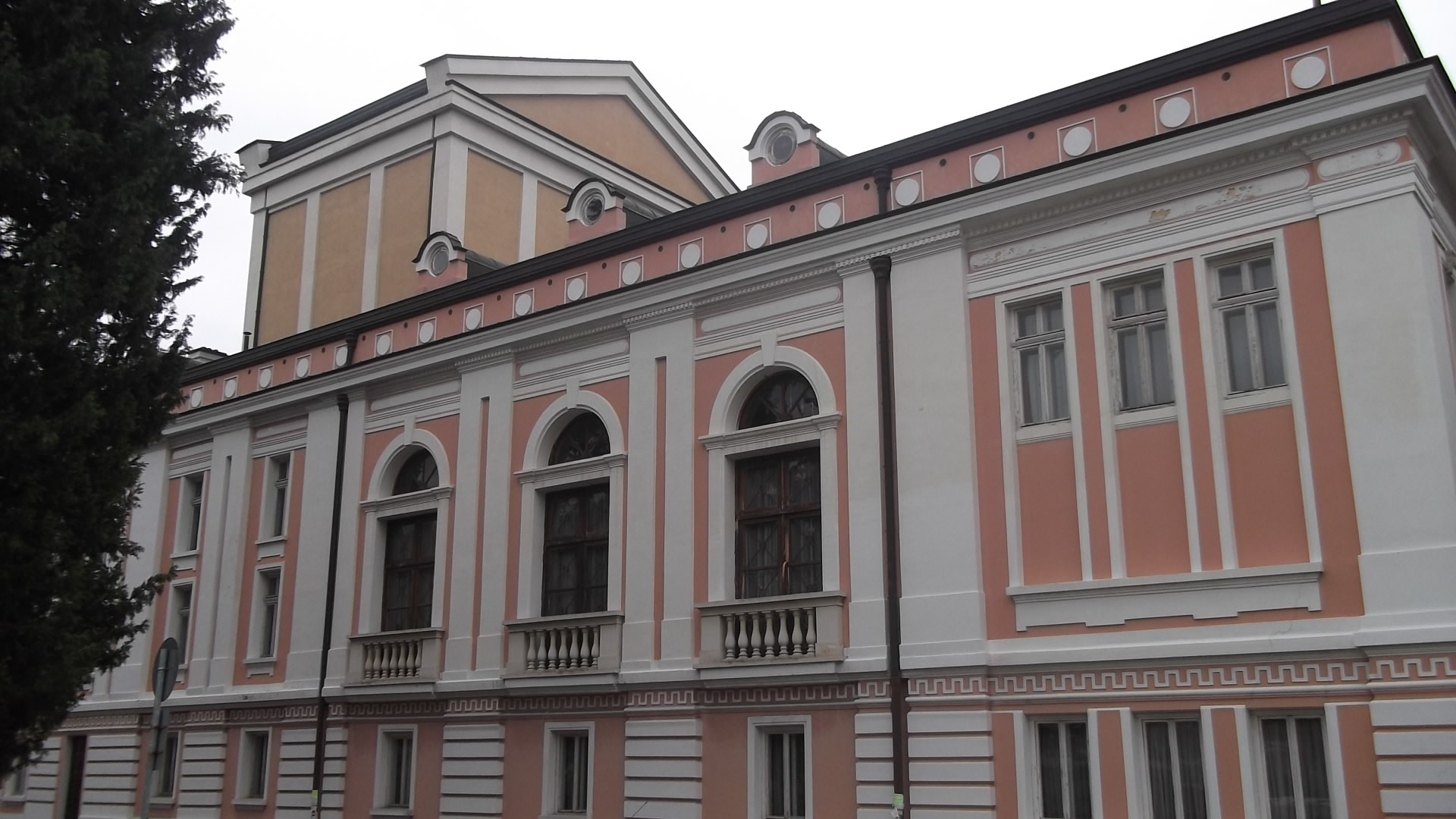 Драматичен театър "Гео Милев" - гр. Стара Загора